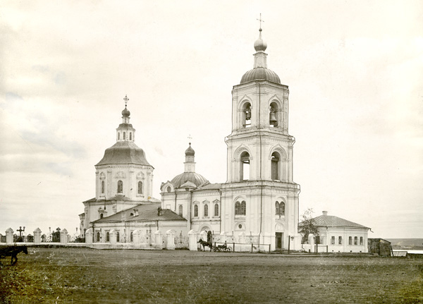 Воскресенский собор (г. Красноярск)